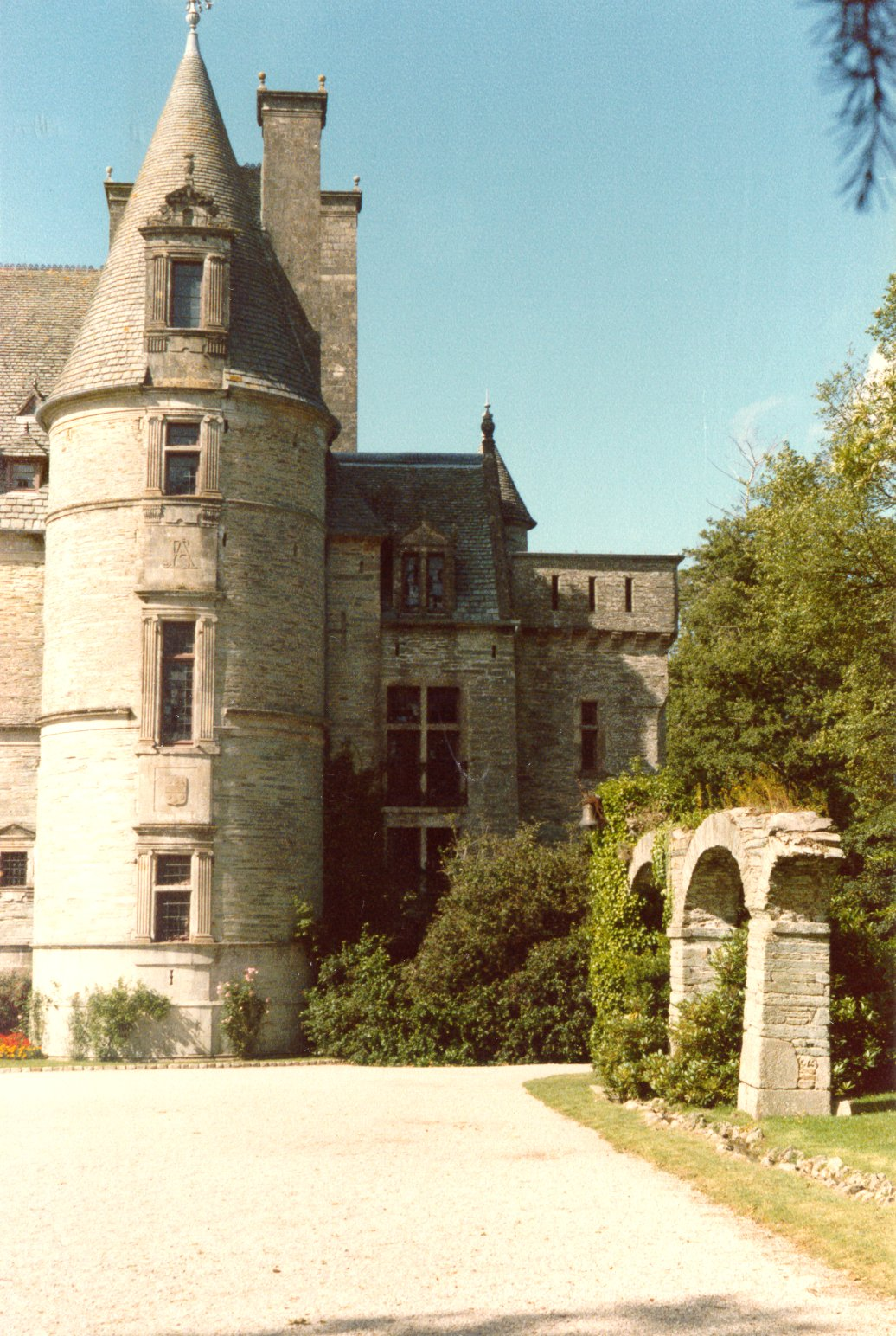 Vue d'une parite de la façade du Château des Ravalet à Tourlaville